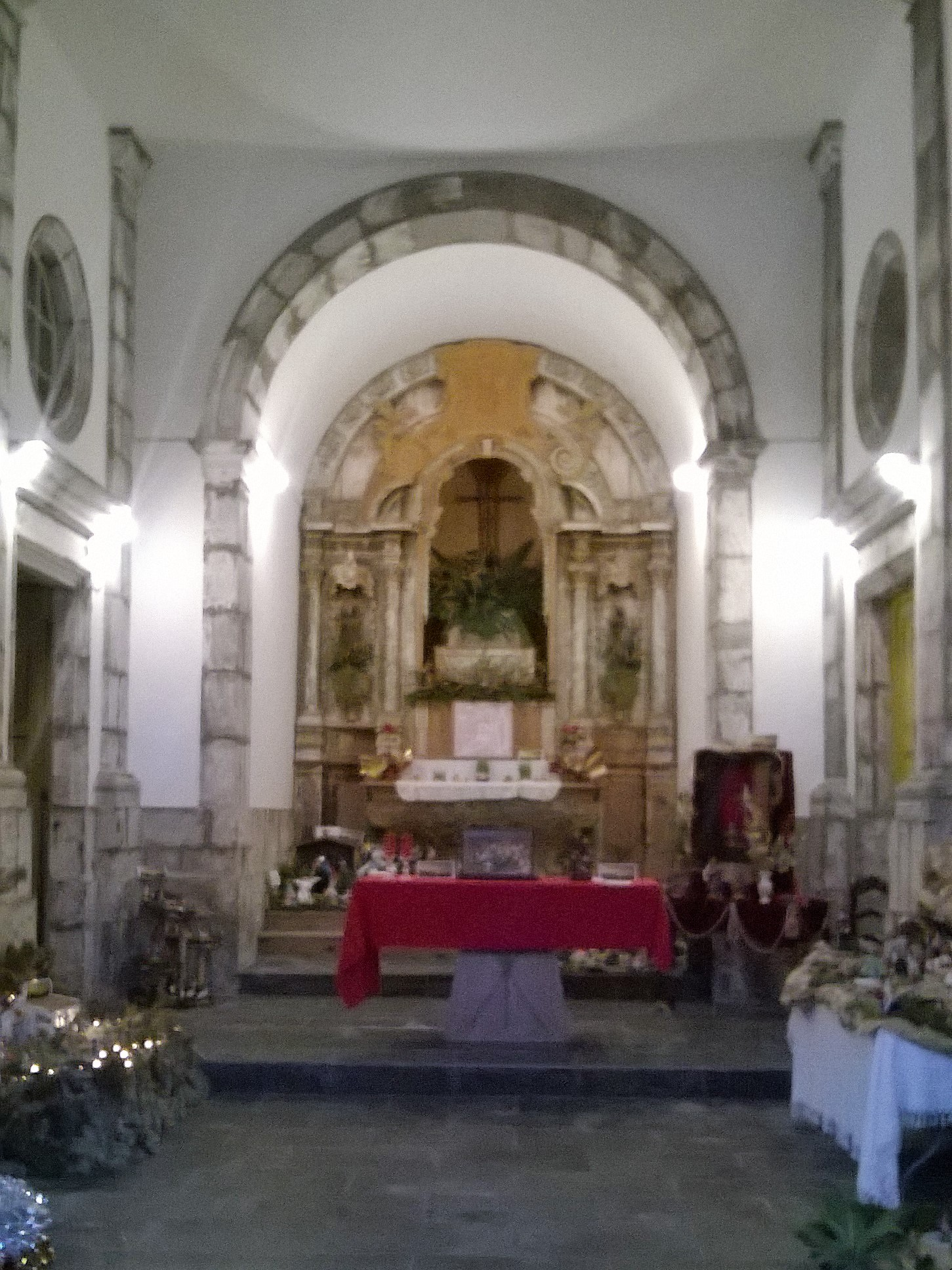 Ermida de Nossa Senhora da Saúde, Praça Velha, Angra do Heroísmo, ilha Terceira, Região Autónoma dos Açores, Portugal.